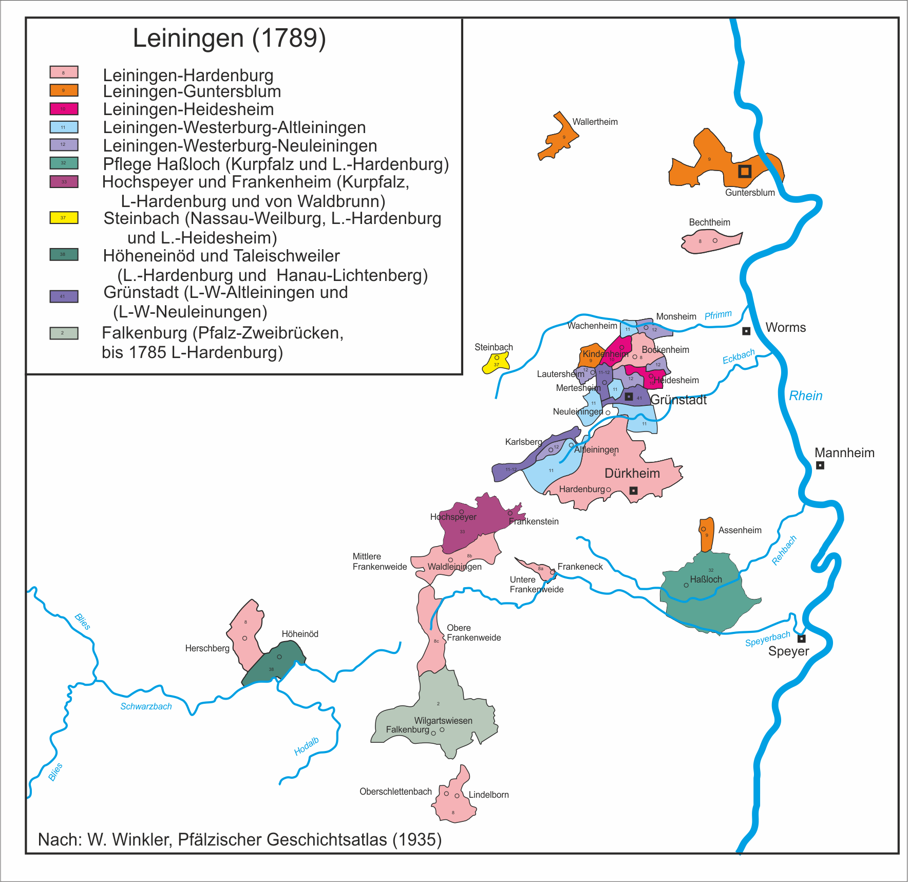 gemaakt op basis van Wilhelm Winkler, Pfälzischer Geschichtsatlas. (1935)